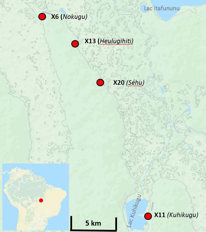 Complexe archéologique de Kihikugu